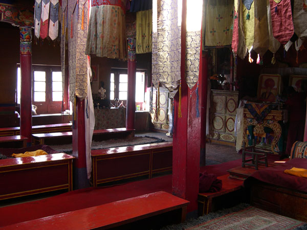 Monestir (Gompa) de Lamayuru, a Ladakh, estat de Jammu i Caixmir, Índia